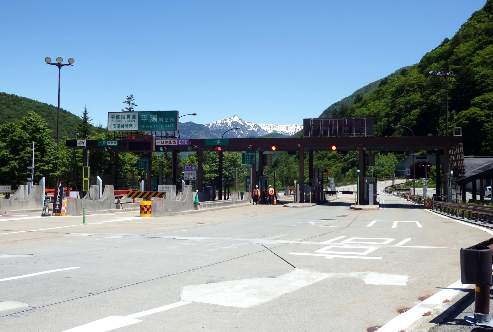 平湯料金所